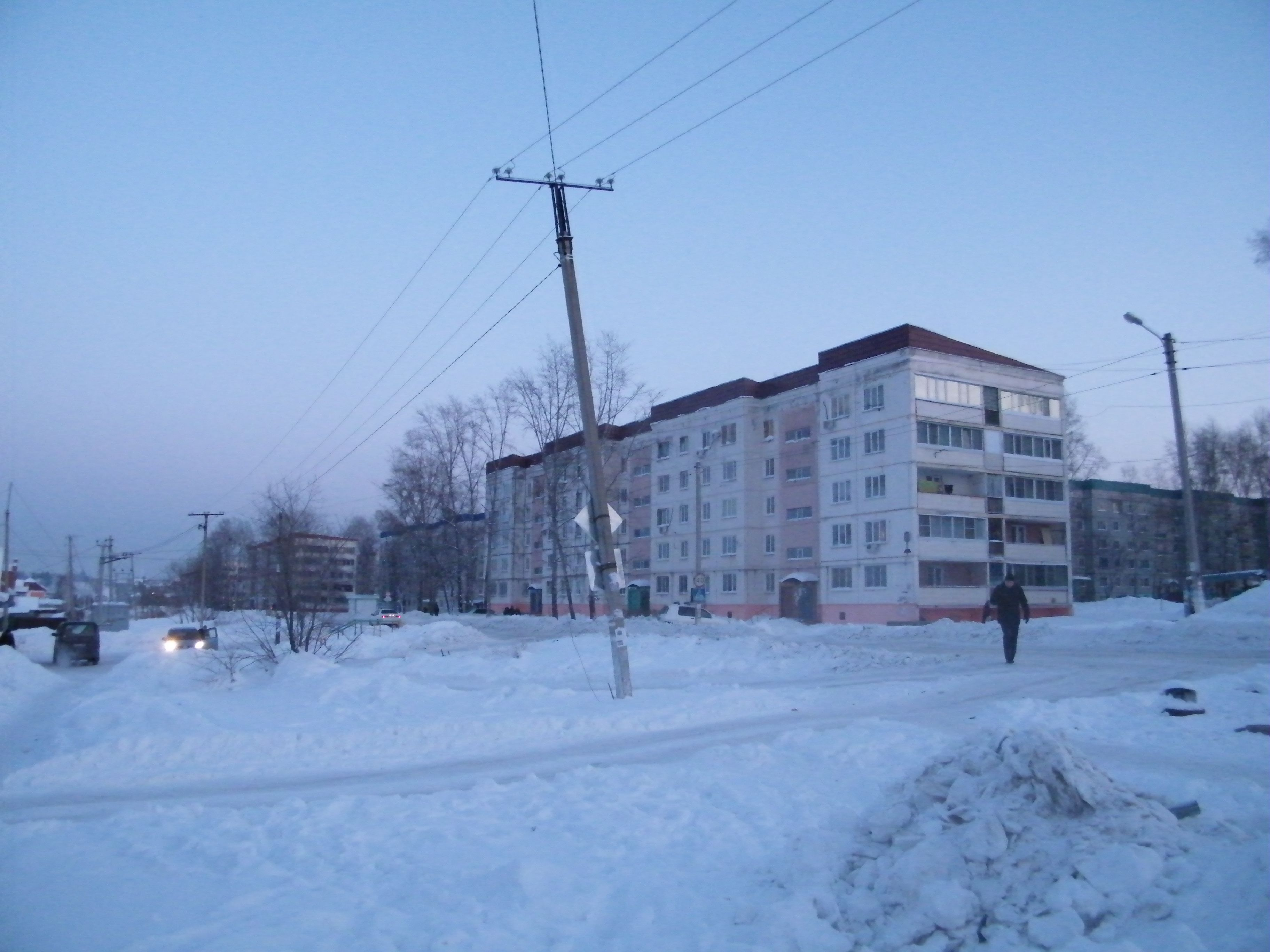 Село Некрасовка Хабаровский край